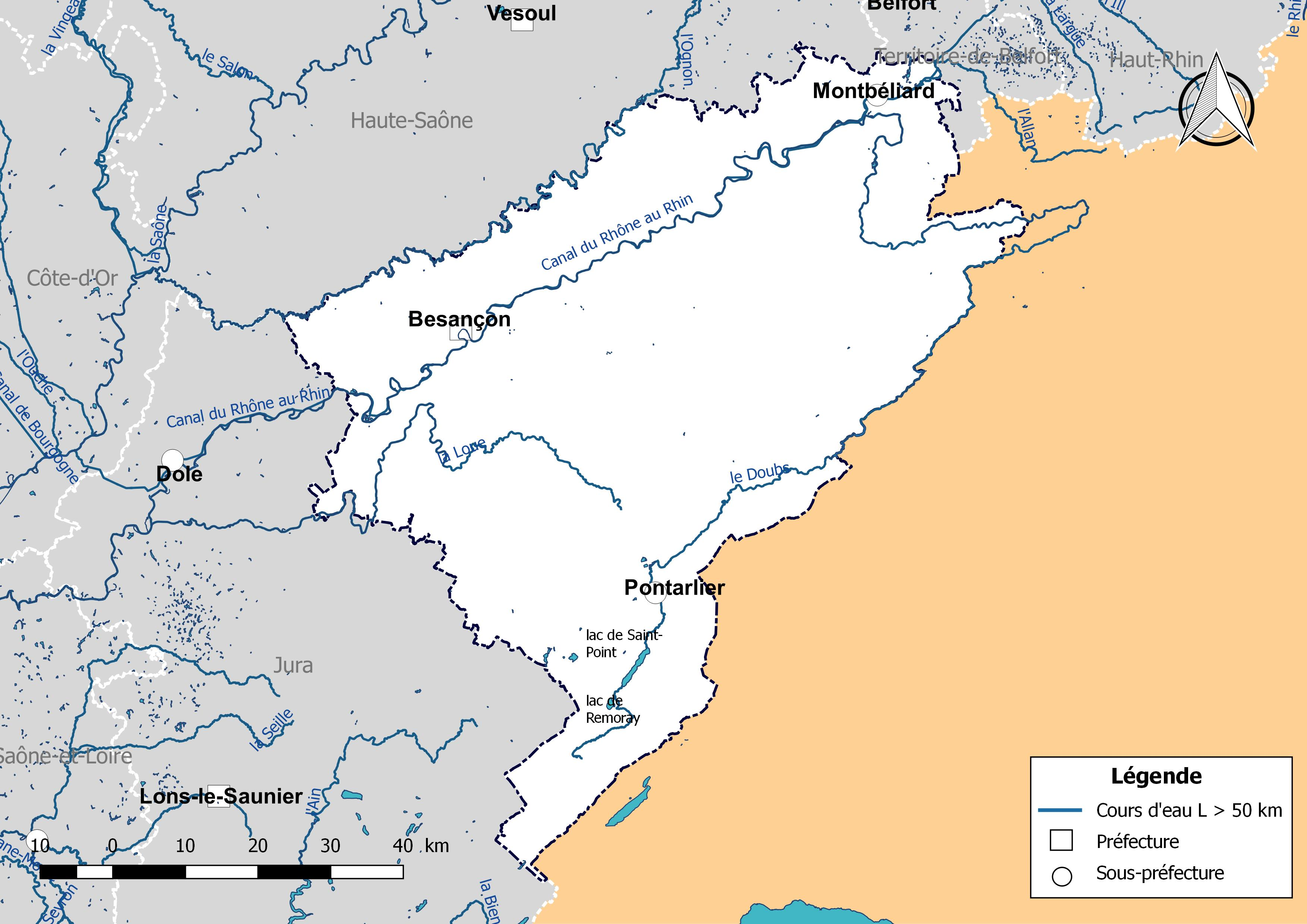 Carte des cours d'eau de longueur supérieure à 50 km drainant le département du Doubs (France).